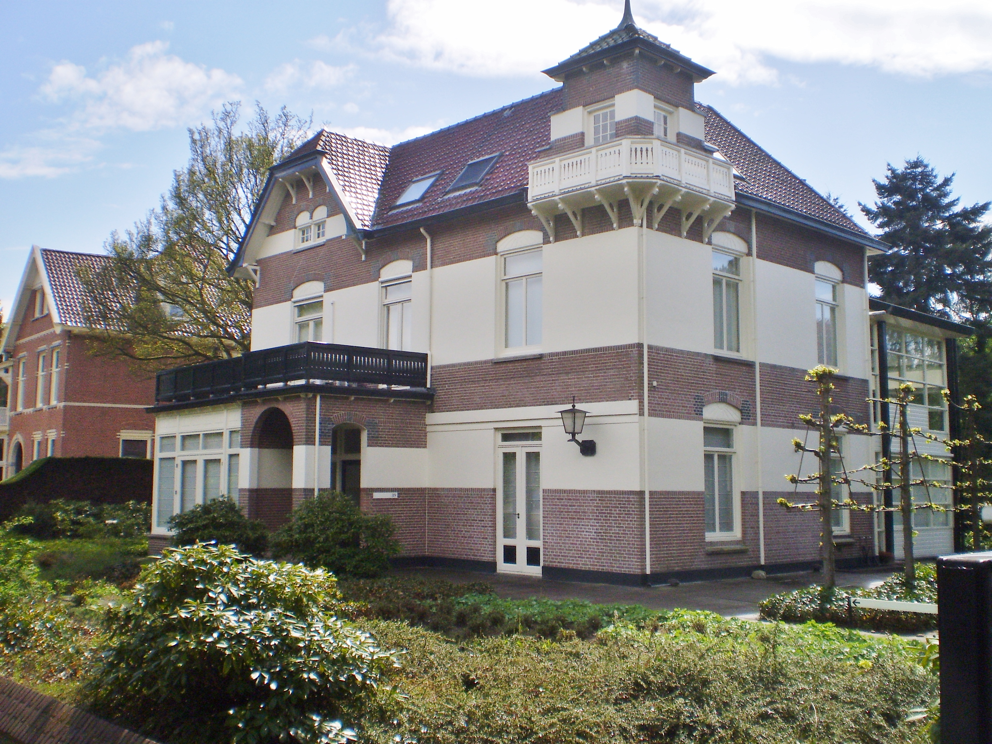 Amsterdamsestraatweg 39 westzijde